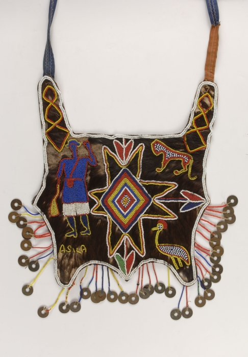 Het voorschortje is een unica, een bijzonder stuk dat werd verworven in Onyege. Het is gemaakt van koehuid en bezet met glaskraaltjes in blauw, geel, groen, rood en wit. De band waarmee het schortje bevestigd wordt is uit textiel genaaid. Volgens informatie van de Fraters behoorde het schortje aan een vrouw die Asila heette. Deze naam heeft zij ook op het schortje aangebracht, vlak onder de vrouwenfiguur. De vrouw draagt een rood sieraad om haar middel. Verder is rechtsonder een kraanvogel en rechtsboven een leeuw (?) aangebracht. Vanuit het ornament in het midden lopen pijlpunten. Het schortje is afgezet met 36 bronzen muntjes, de 'east african one cent'. De oudst gebruikte munt dateert uit 1922, de meest recente uit 1954. Aan een muntzijde staan vier olifantstanden, aan de andere de britse kroon en de naam van de heersende monarch; o.a. Georgius V, VI en Sextus en Queen Elizabeth the second. De eerste bronzen east african shilling van 1 cent werd in 1922 geintroduceerd in Kenya, Tanganyika (huidige Tanzania) en Uganda. De laatste munt werd in 1964 geslagen vlak voor de onafhankelijkheid van Kenya. Wegens het geheel ontbreken van munten uit de periode 1955-1964 zou het schortje rond 1954 gedateerd kunnen worden. Gebruikssporen ontbreken. Vermoedelijk is het schortje door een Luo vrouw als gift vervaardigd voor de Fraters. De term Onyege heeft namelijk twee betekenissen. Ten eerste is het een gehucht langs de weg Homa Bay-Kendu Bay, die langs de oever van het Victoria Meer loopt. Ten tweede is Onyege de Luo benaming voor hun traditionele kleding. Ze versieren hun kleding met abstracte, geometrische patronen (informatie R. de Ruijter). Dit schortje vormt daarop duidelijk een uitzondering, de afbeelding is sterk Koloniaal/Christelijk beïnvloed.